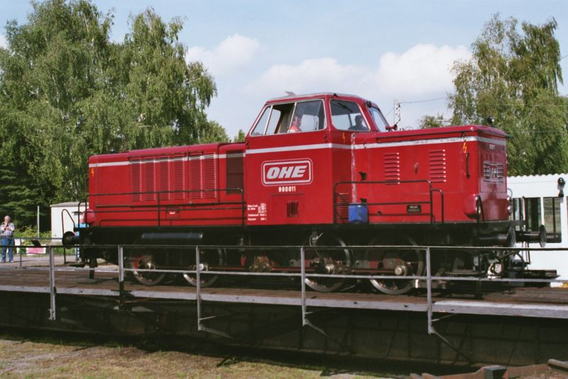 MaK 800 D auf Drehscheibe SEH am 11.09.2004